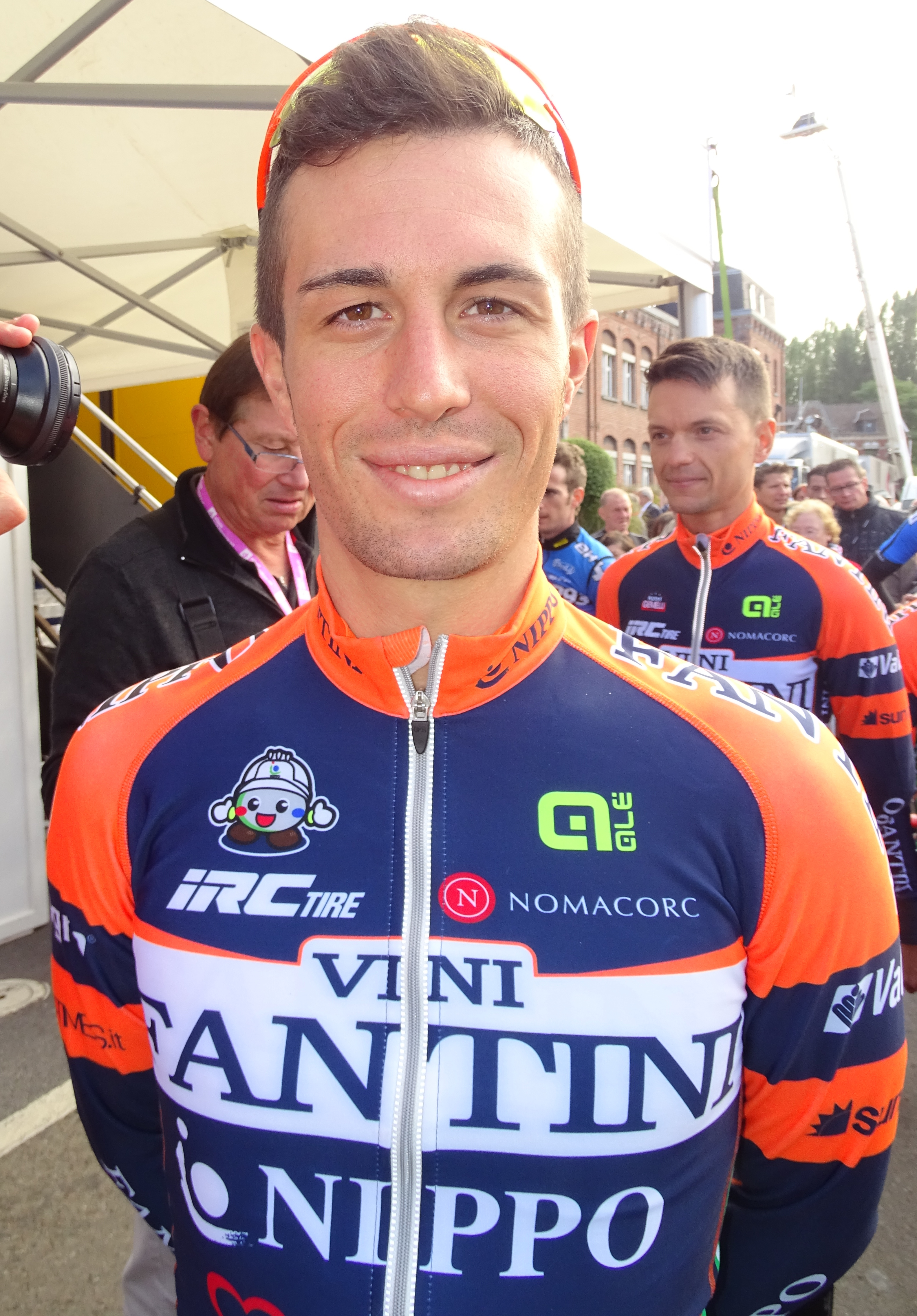 Reportage réalisé le dimanche 6 septembre à l'occasion du départ et de l'arrivée du Grand Prix de Fourmies 2015 à Fourmies, Nord-Pas-de-Calais, France.